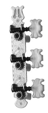 Gitarre Mechanik